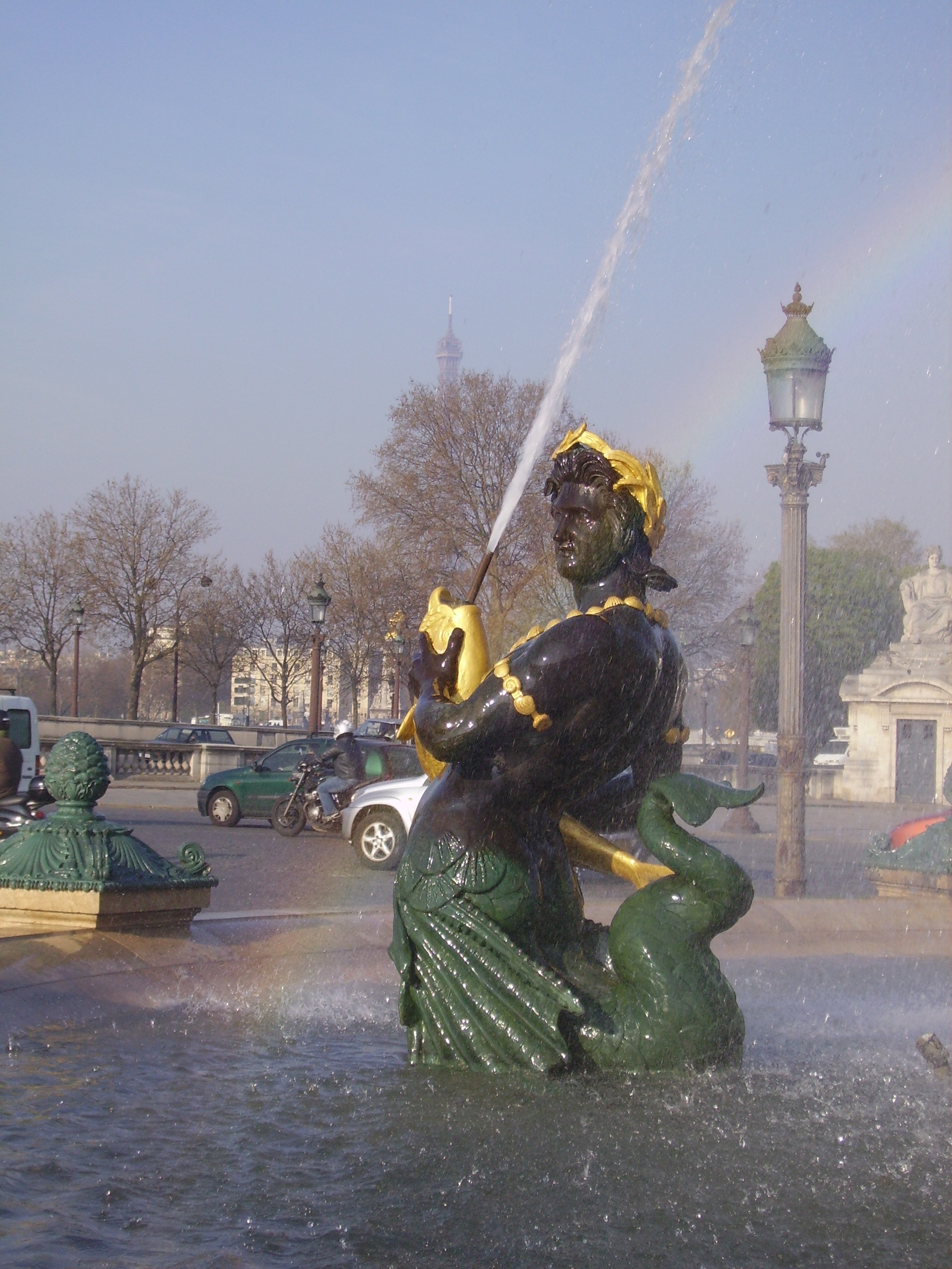 Fontaine at Place de la Concorde